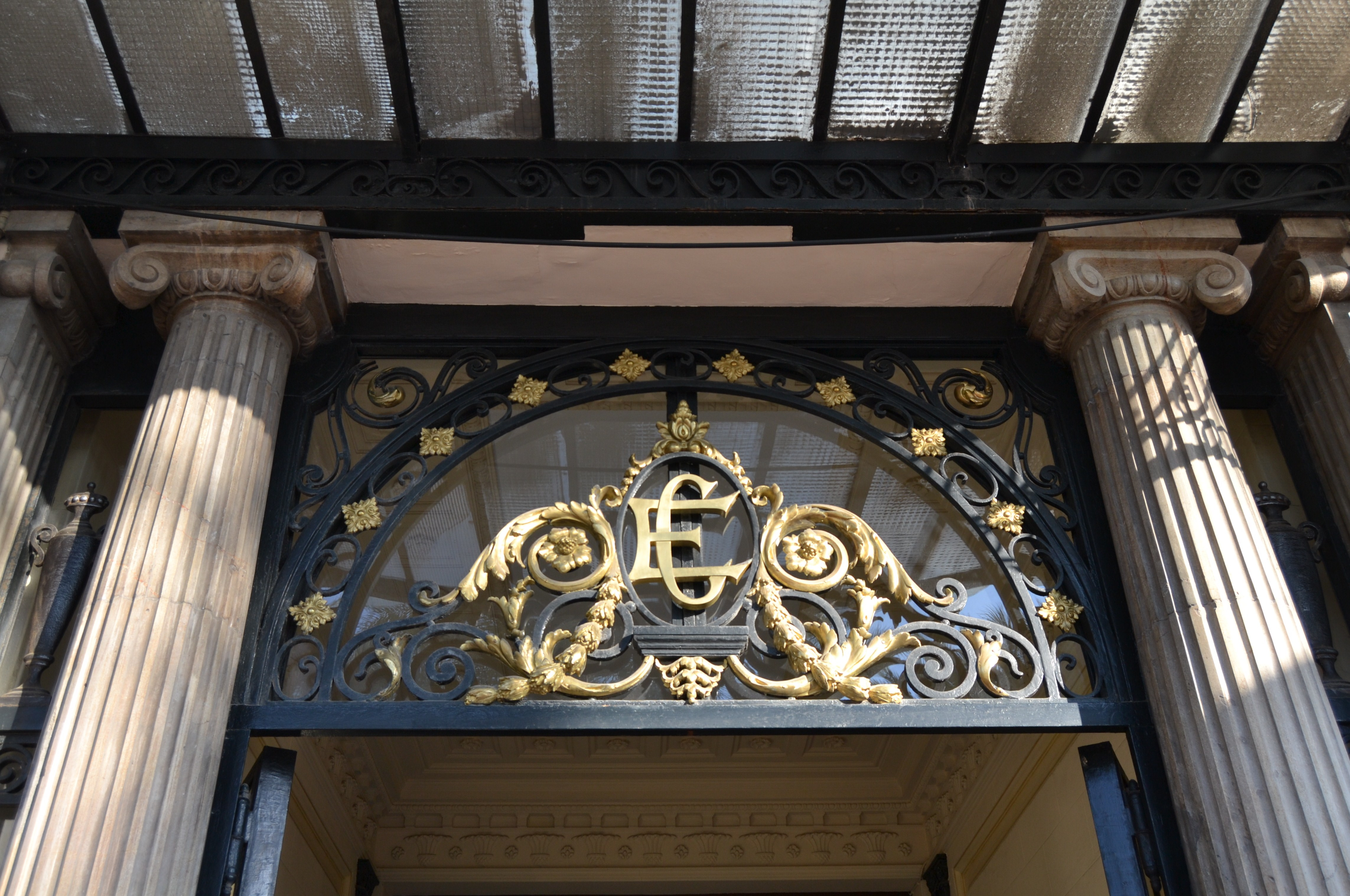 Detall de l'entrada a la casa Carbonell d'Alacant.